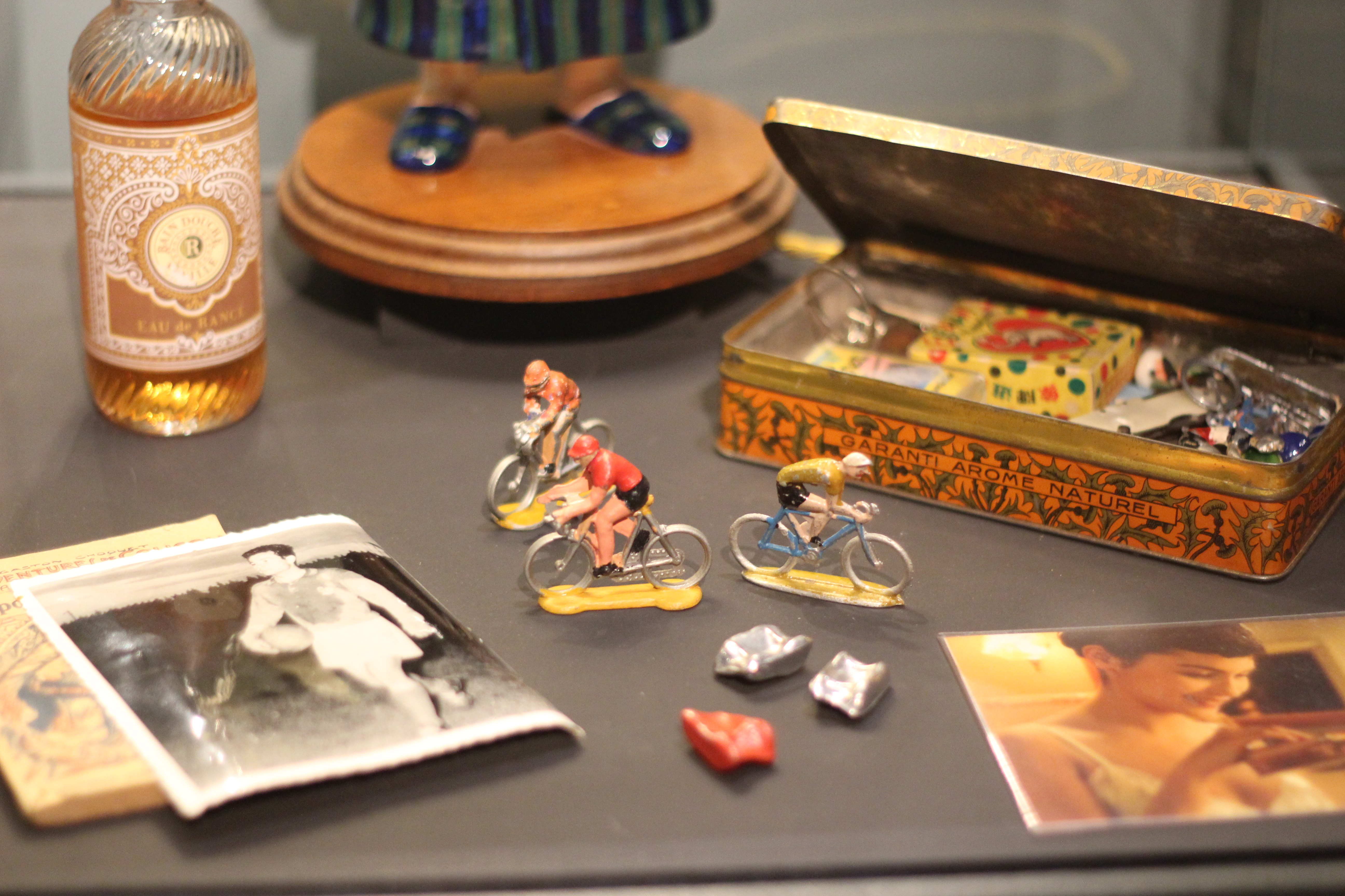 Souvenirs de Dominique Bretodeau dans le film Le Fabuleux Destin d'Amélie Poulain. Exposition "Caro/Jeunet" au musée Minature et Cinéma en 2018-2019.